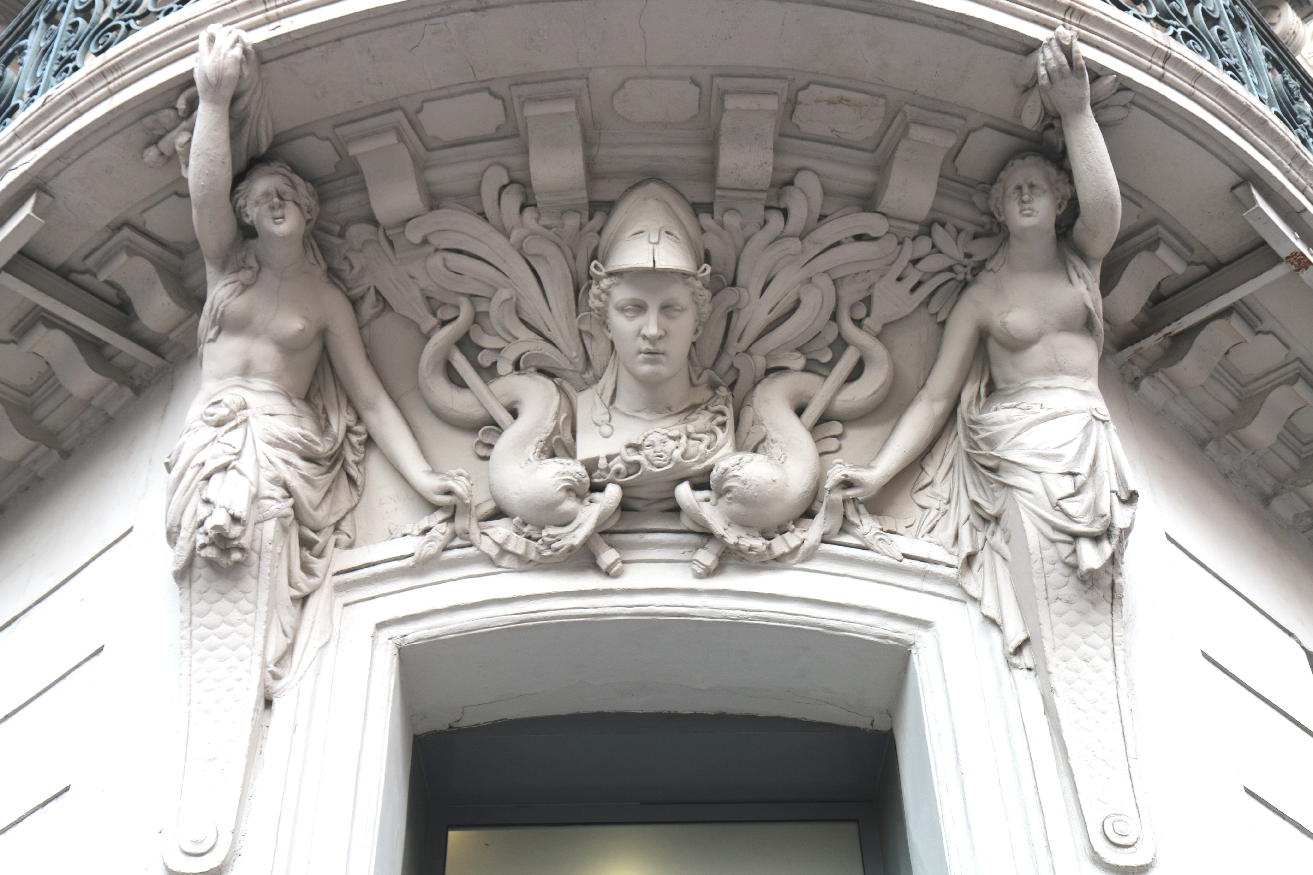 Cariatides sculptées par Lange Guglielmo, soutenant un balcon situé au 48 du boulevard de Strasbourg à Toulon.